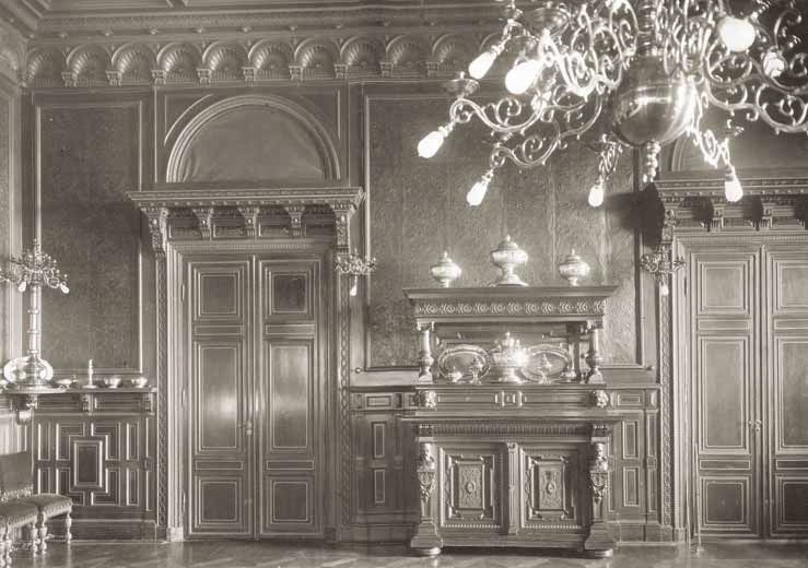 Kronprinsparet Gustav (v) och Viktorias matsal, som den var inredd från 1880-talet till 1971. Foto från 1890-talet.